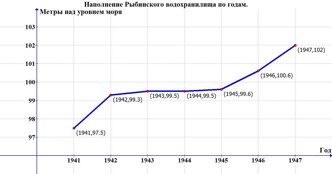 График наполнения Рыбинского водохранилища в период 1941-1947 годов. Со страницы 114 книги: 25 лет Угличской и Рыбинской ГЭС / Малышев Н. А., Мальцев М. М.. — Л.: «Энергия», 1967.